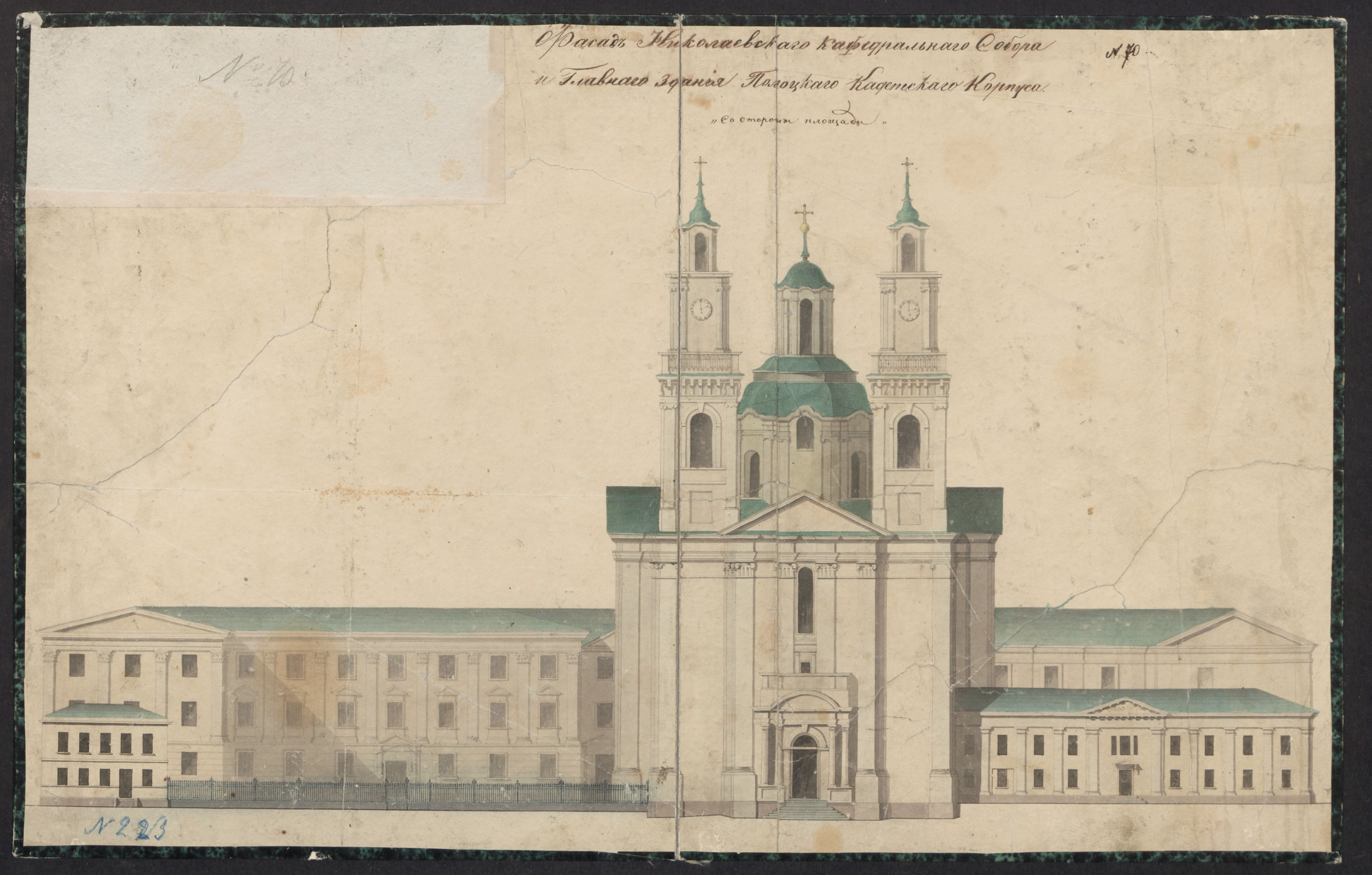 Беларуская (тарашкевіца): Полацак (Połacak), пляц Рынак (plac Rynak). Касьцёл Сьвятога Стэфана і калегіюм езуітаў